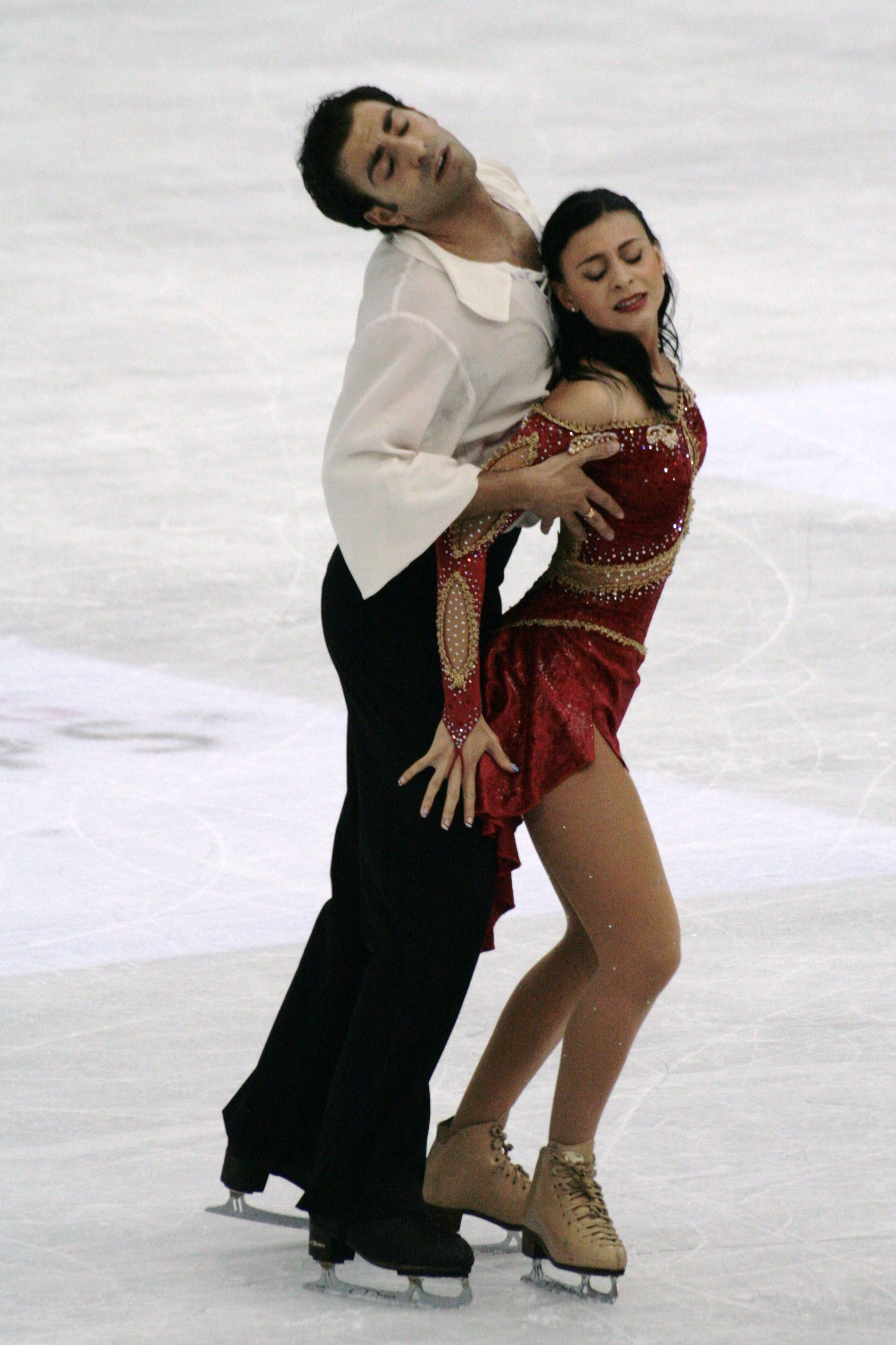 Лоренца Алессандрини и Симоне Ватури (Италия) на чемпионате мира по фигурному катанию 2012